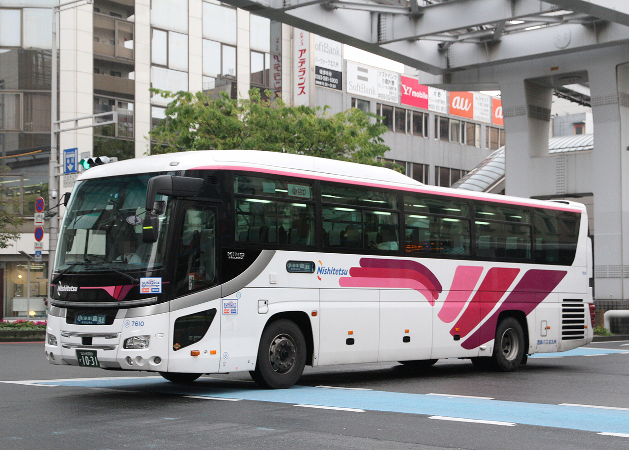 登録番号 北九州200か10-31 社番：7610 西鉄バス北九州㈱小倉営業所所属 昼行高速路線用車両 2015年4月19日 小倉平和通にて撮影 撮影者 Zondag2000